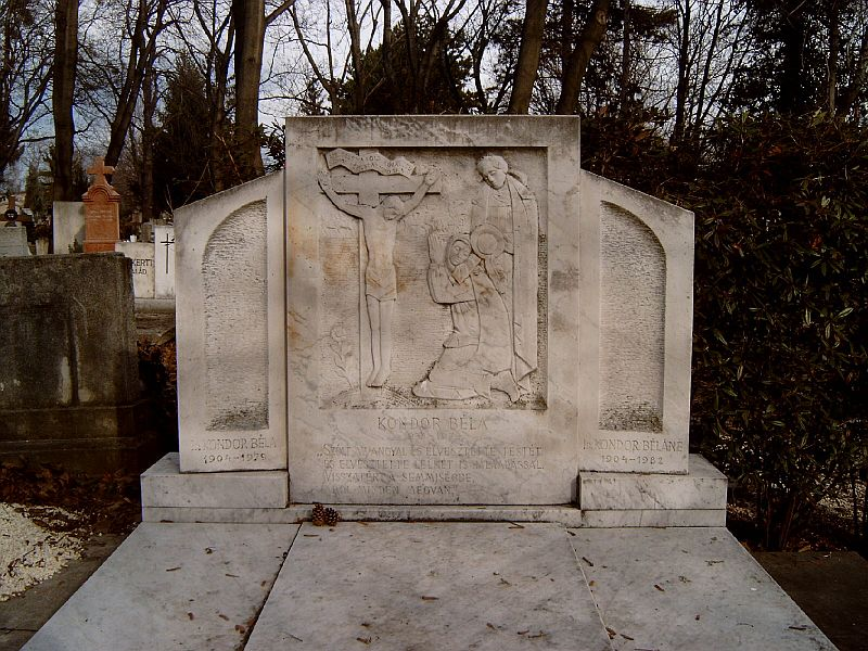 Kondor Béla sírja Budapesten. Farkasréti temető: 6/9-1-1/2.